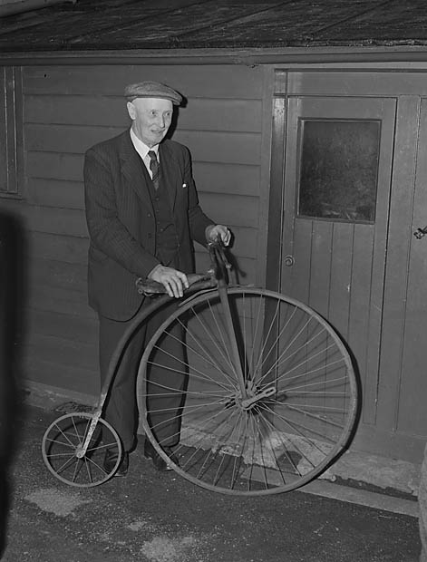 Teitl Cymraeg/Welsh title: Beic Penny Farthing Ffotograffydd/Photographer: Geoff Charles (1909-2002) Nodyn/Note: An image of Hugh Pugh, Forden House, Dolgellau with his "Penny Farthing" bicycle. Dyddiad/Date: December 11, 1953 Cyfrwng/Medium: Negydd ffilm / Film negative Cyfeiriad/Reference: (gch05363) Rhif cofnod / Record no.: 3367566 Rhagor o wybodaeth am gasgliad Geoff Charles yn Llyfrgell Genedlaethol Cymru More information about the Geoff Charles Collection at the National Library of Wales